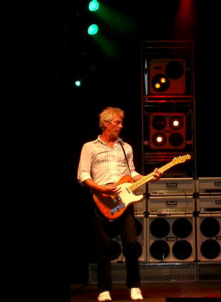 Andrew Bown in Huttwil (Schweiz)